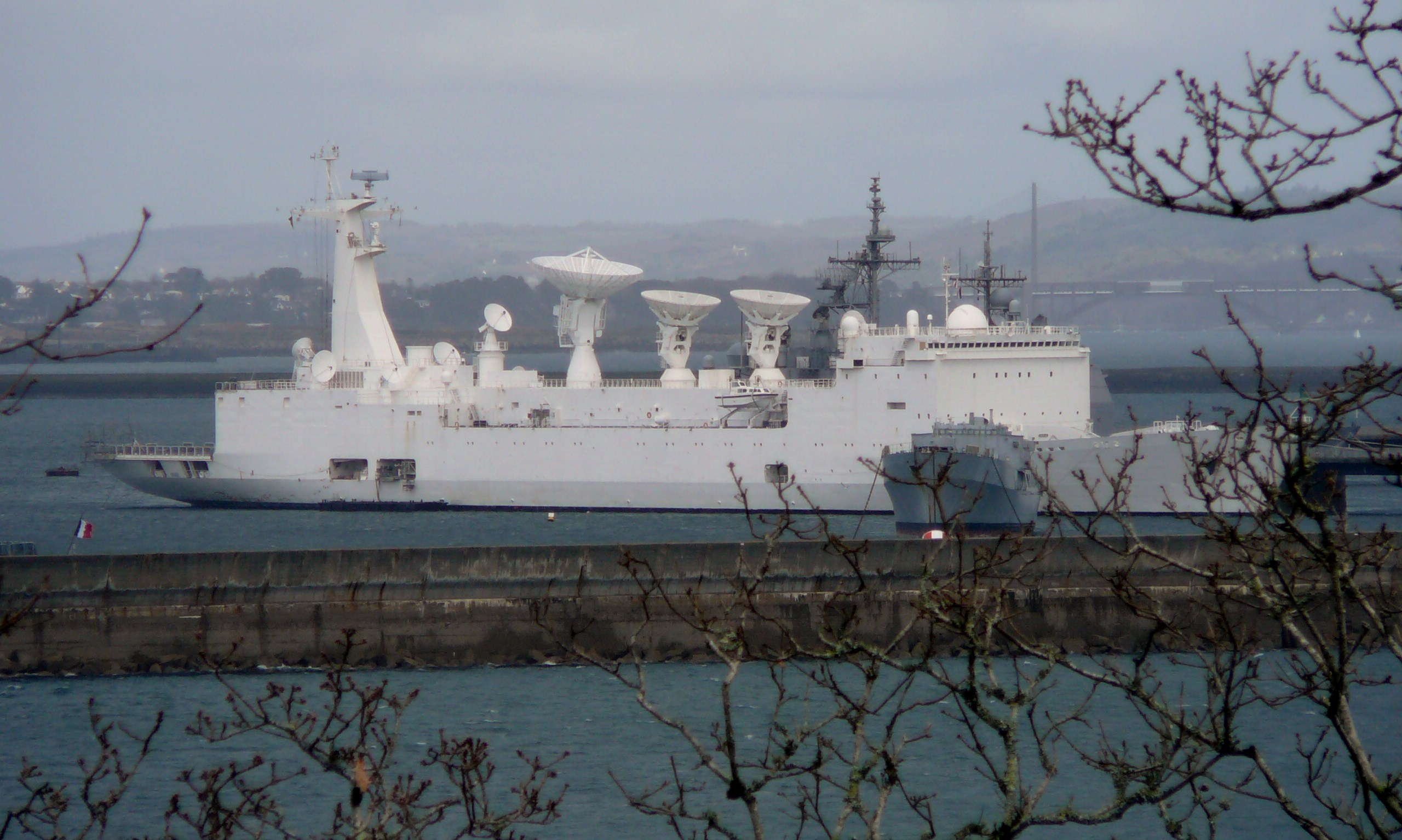 La nave Monge nel porto di Brest